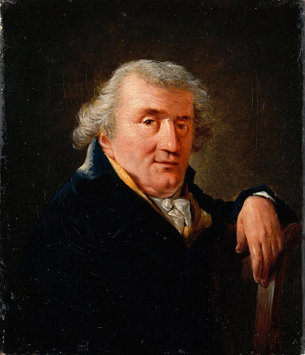 Pierre-René Cacault, peintre